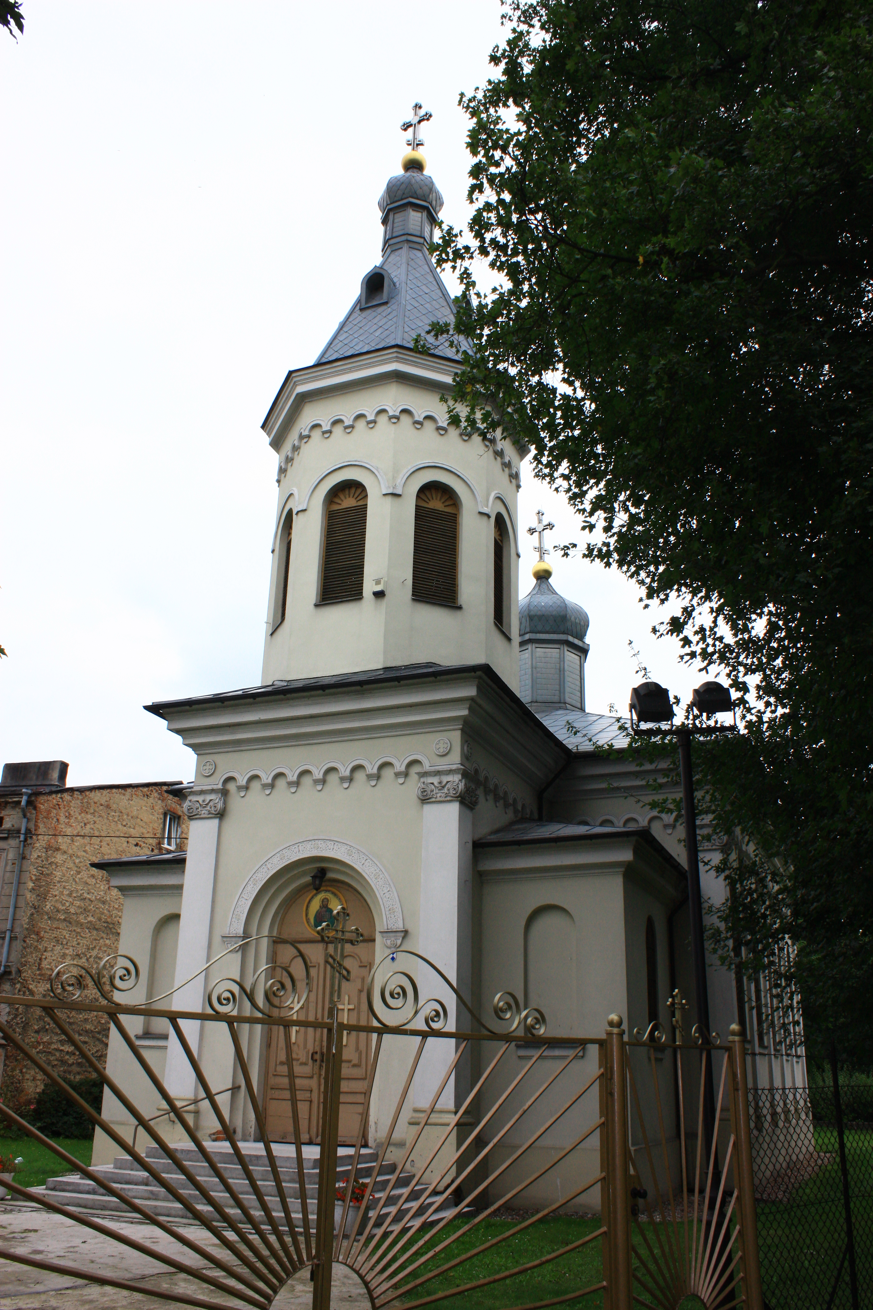 Kalisz, cerkiew prawosławna p.w. śś. Piotra i Pawła, 1928-1930